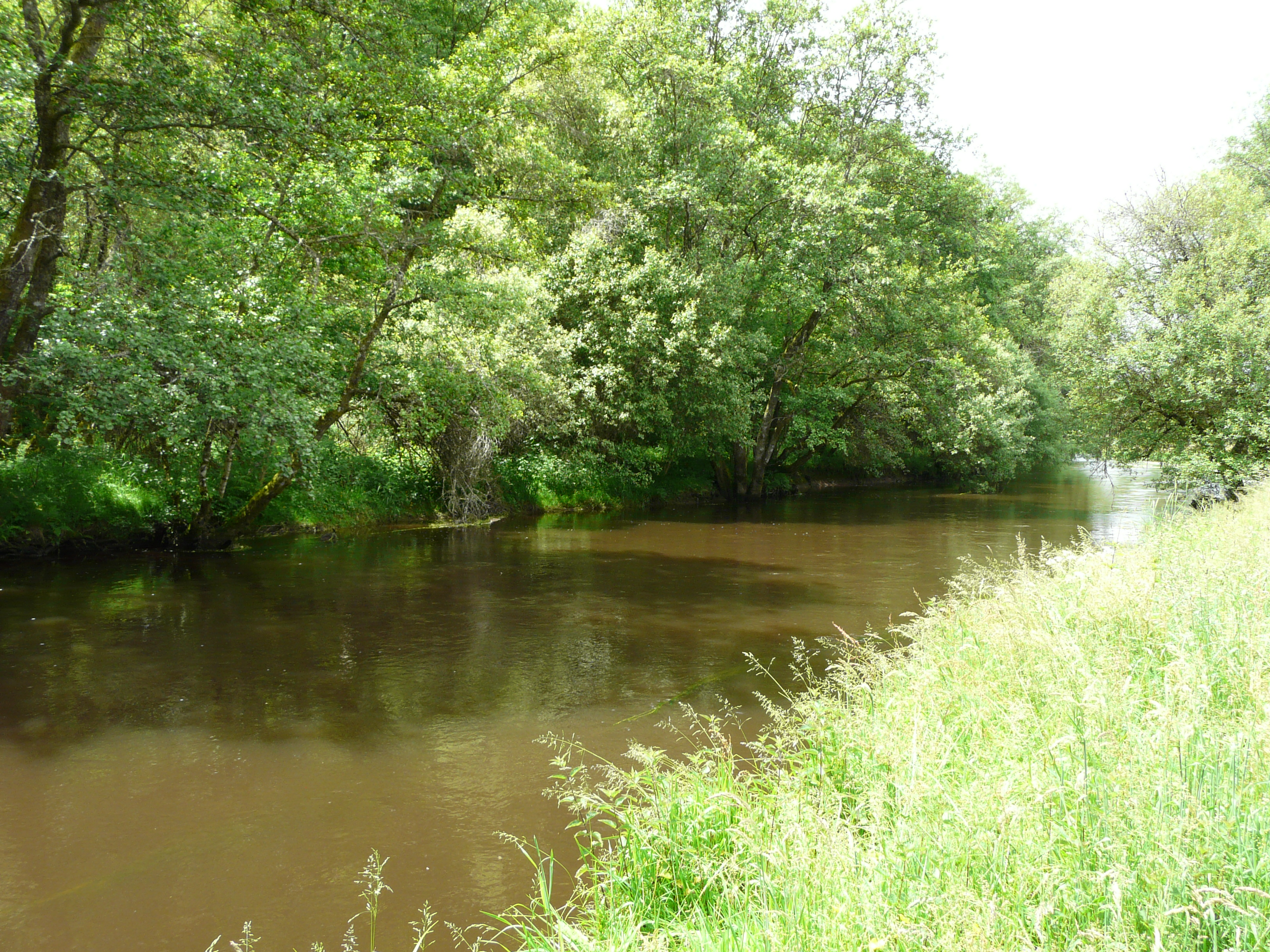 En contrebas de l'aire de la Loutre, la Diège marque la limite entre les communes de Saint-Exupéry-les-Roches (au premier plan) et Mestes (en rive opposée), Corrèze, France.